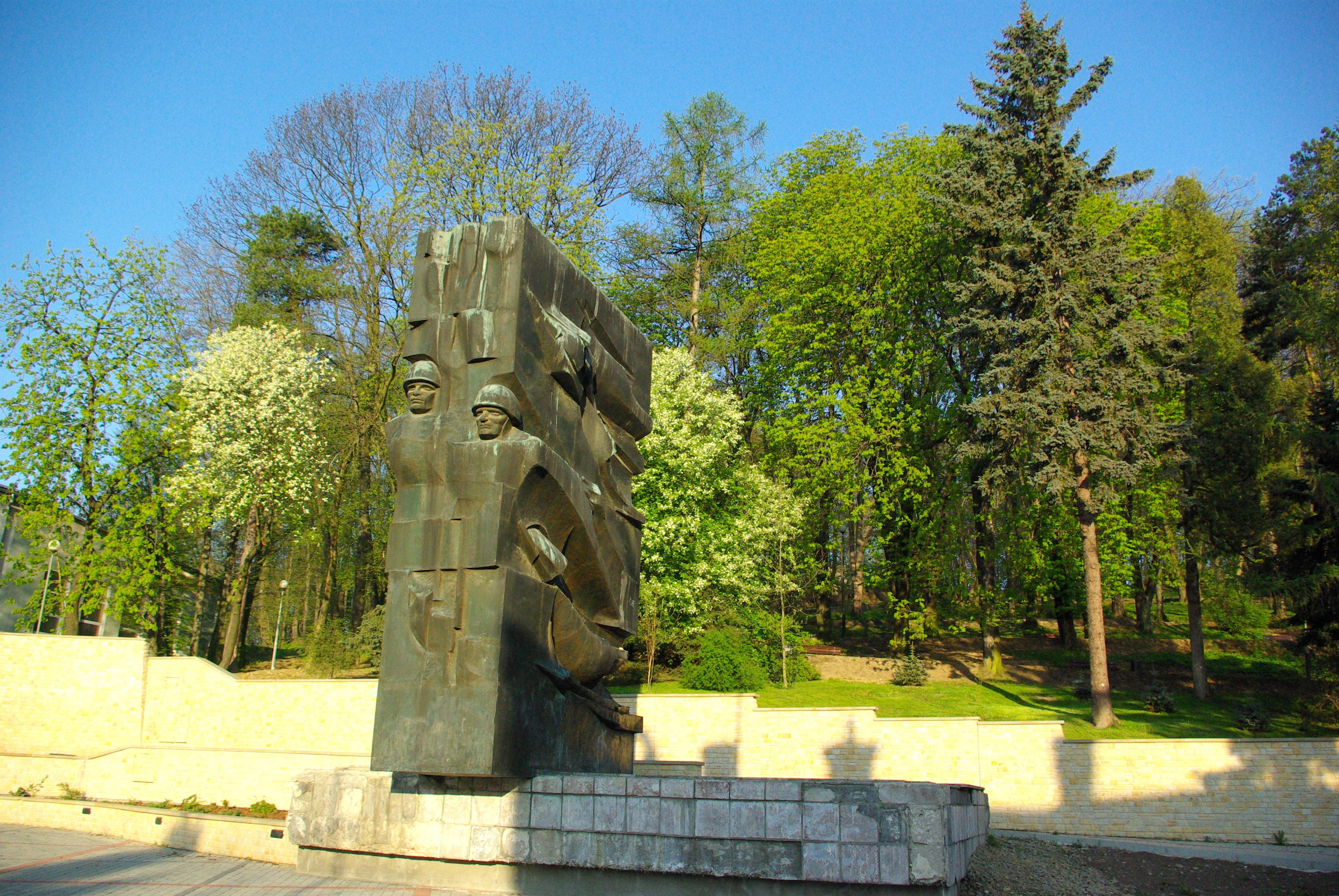 Pomnik Wdzięczności Sanok